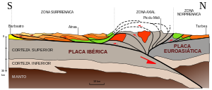 Thin skinned tectonikoaren adibide bat Pirinioak (Espainia eta Frantzia) inguratzen duten tolesturetan eta zamalkaduren kanpoko eremuetan aurki daitezke.